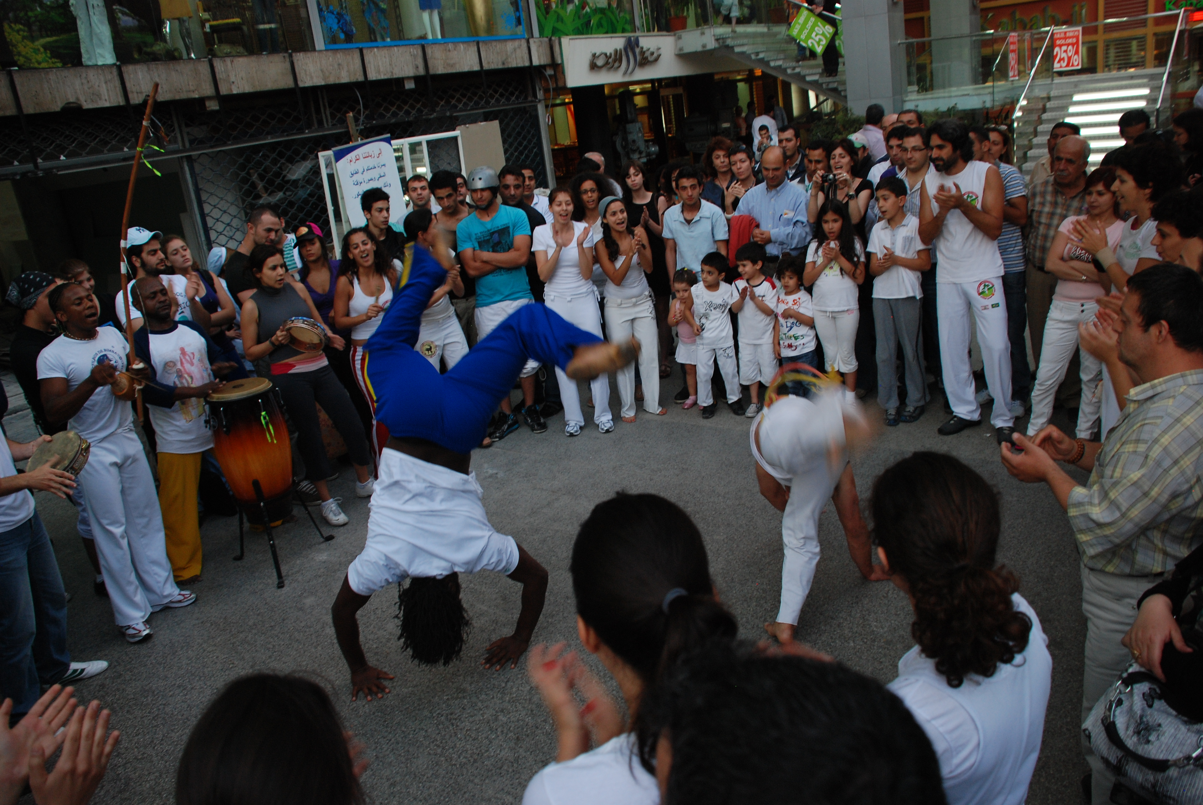 CapoeiraShowHamra